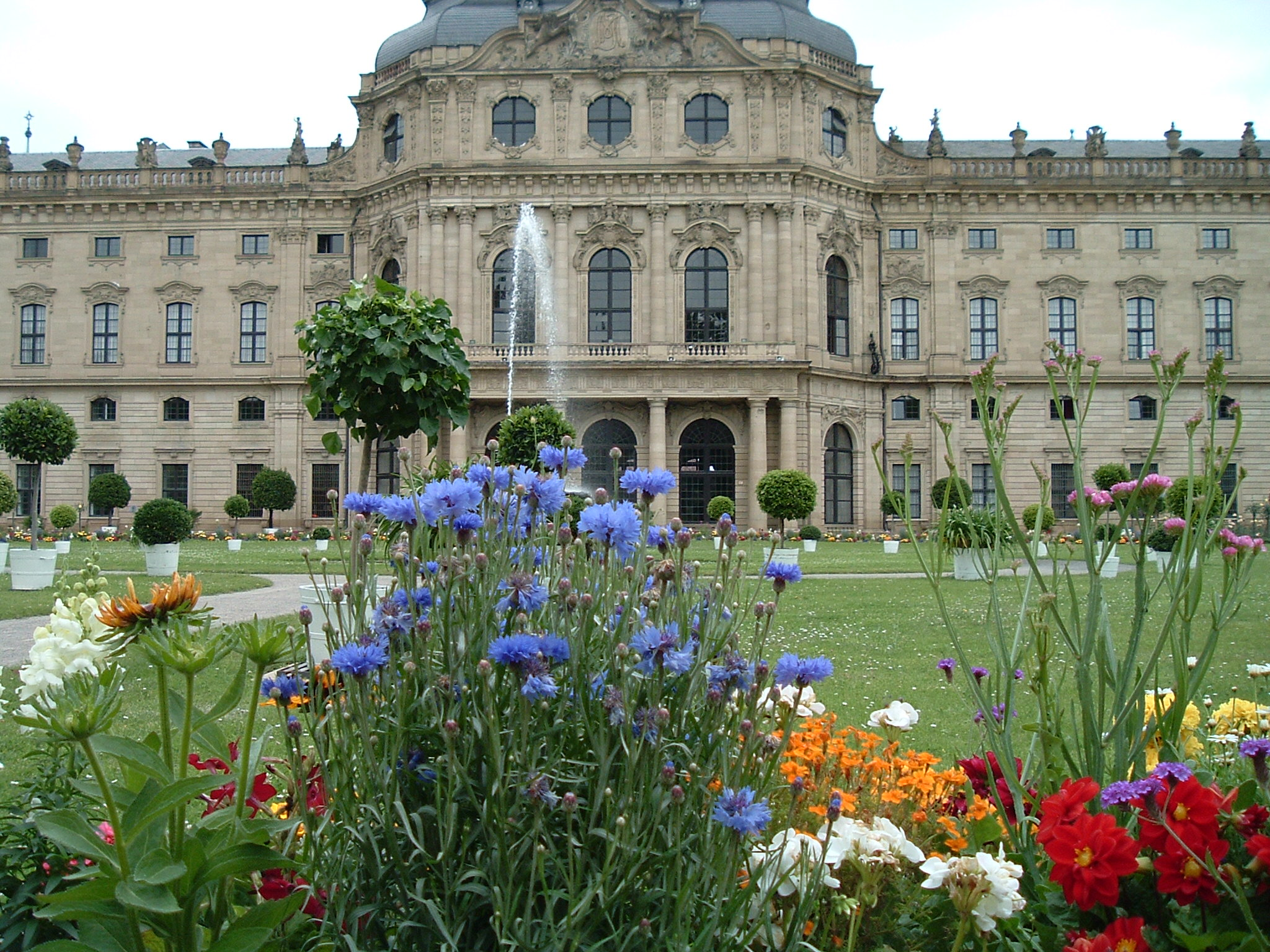 La Résidence de Würzburg, jardins